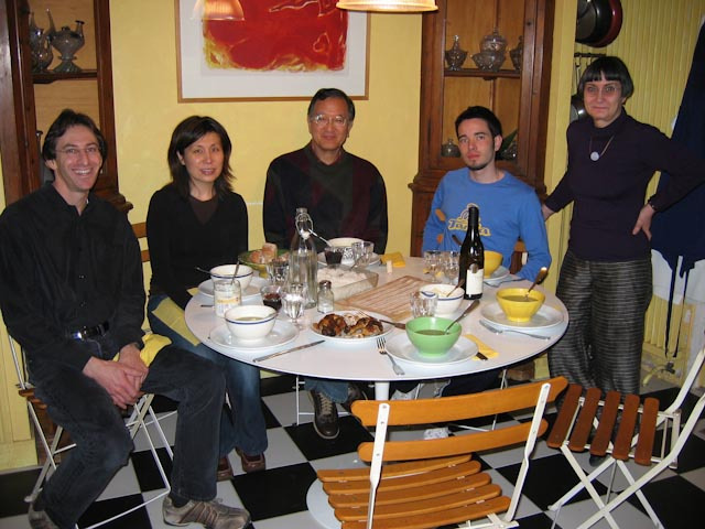 famille d'accueil Alliance française Paris Ile-de-France